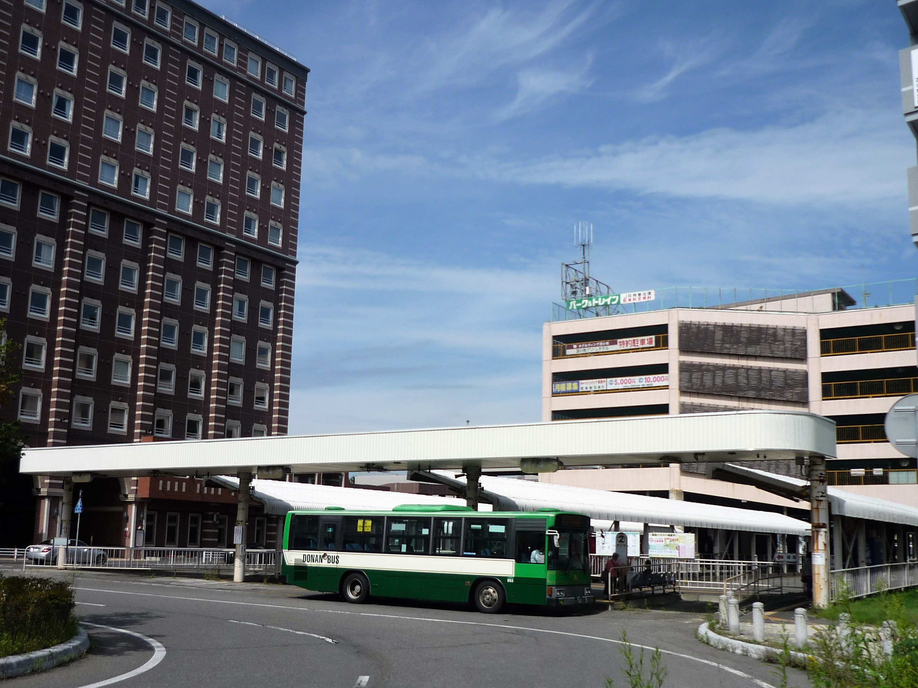 2015年に廃止された苫小牧駅前バスターミナル（2018年8月撮影）